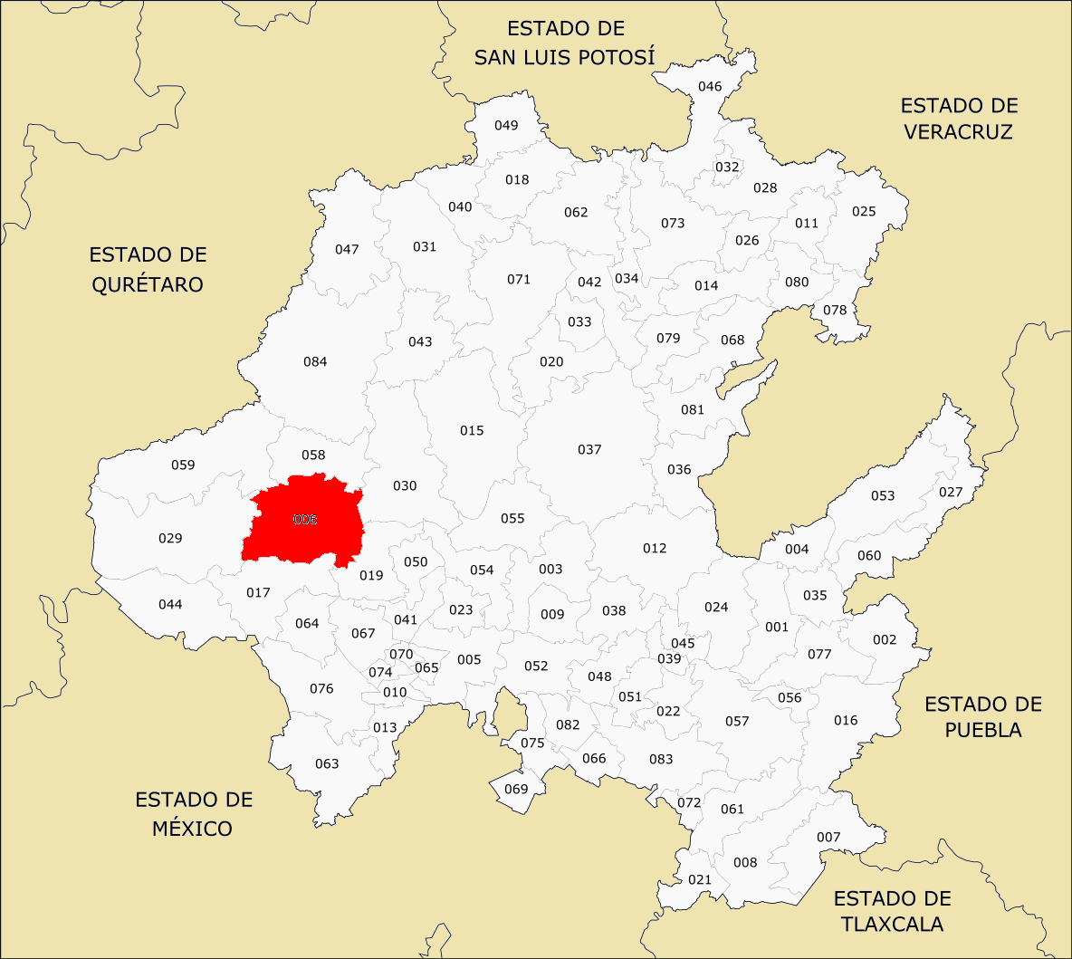 006 Municipios de Hidalgo